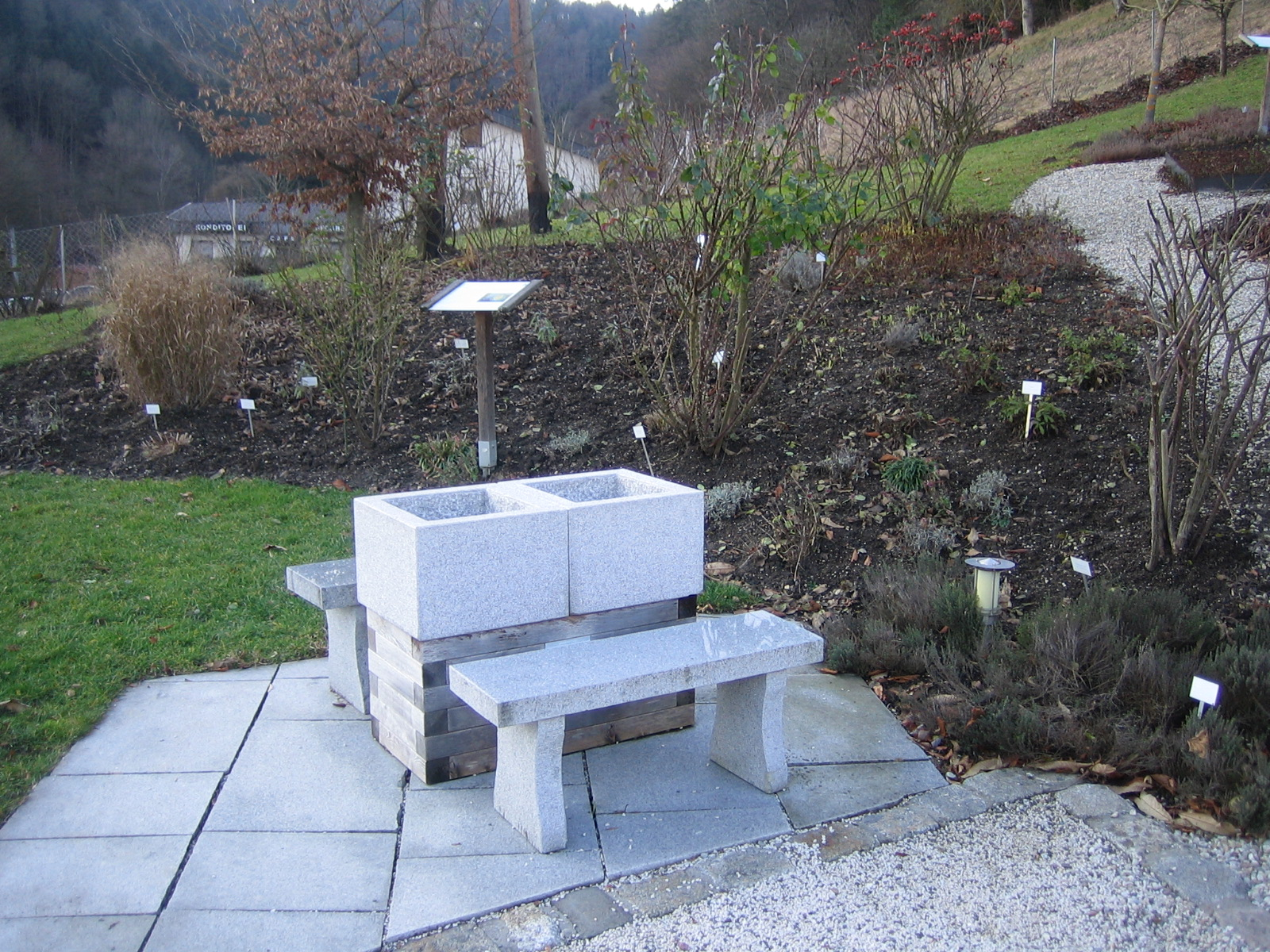 Dufthügel im Kräutergarten Bad Mühllacken